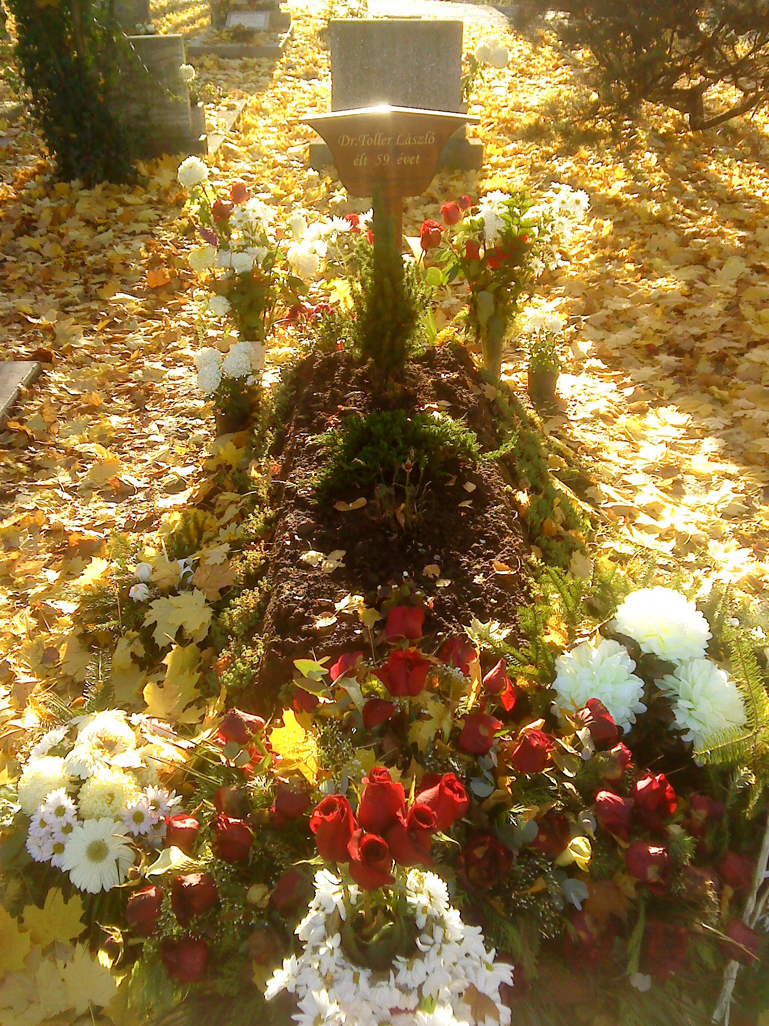 Toller László pécsi polgármester sírja